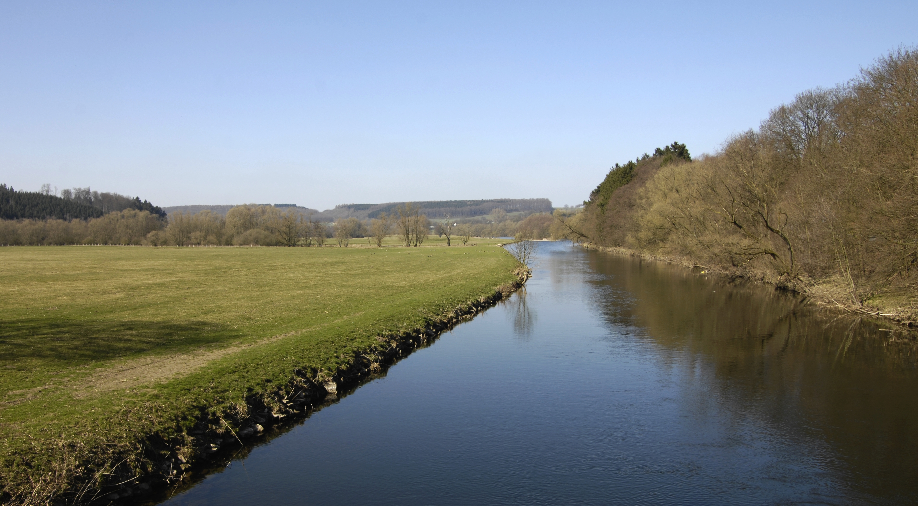 Die Ruhr, Flusslauf Nähe Hüninngen im Naturschutzgebiet „Ruhraue“